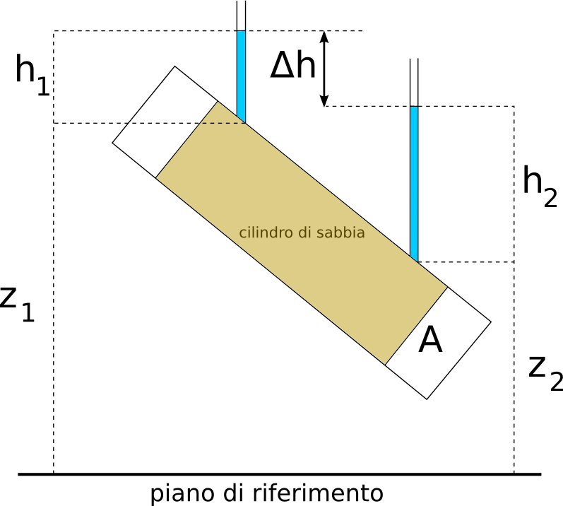 Cilindro di sabbia attraversato da acqua e usato per dimostrare la legge di Darcy.